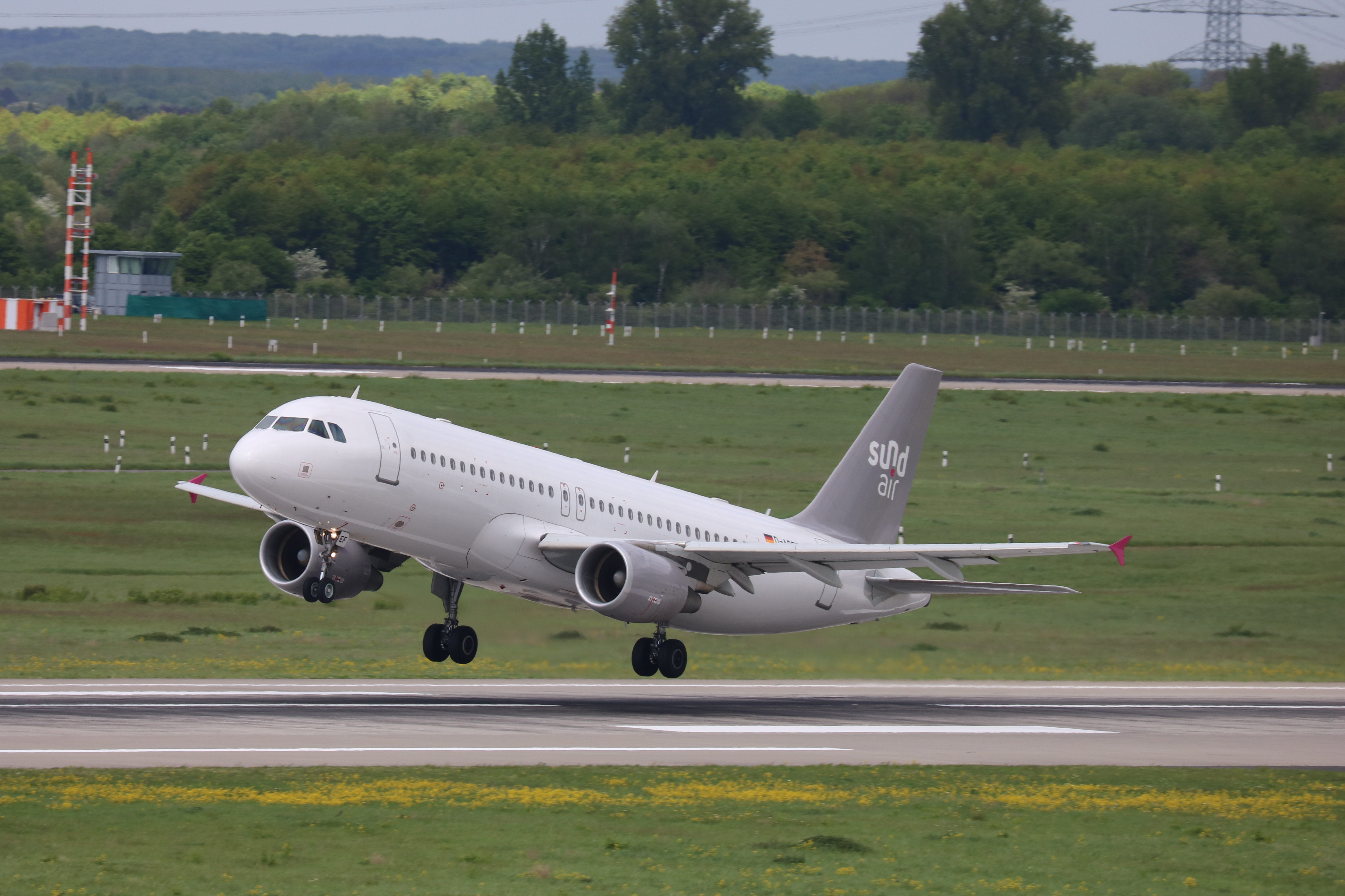 Flughafen Düsseldorf, Airbus A320-200 (D-ASEF) der Sundair